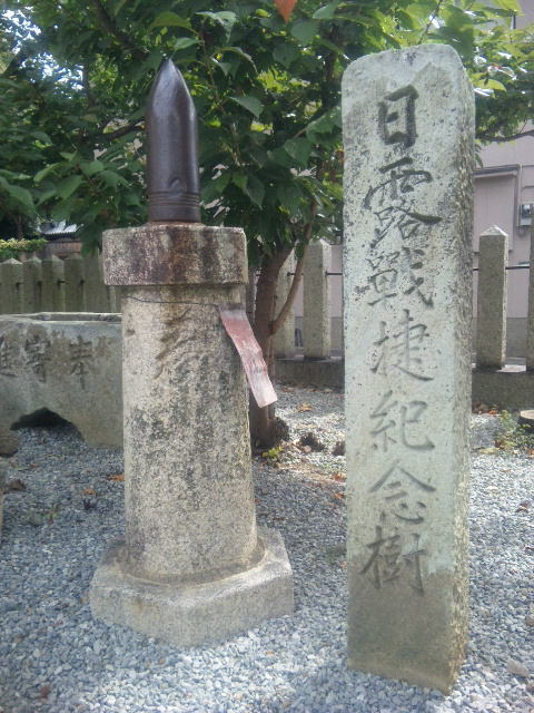 兵庫県姫路市の水尾神社にある「日露戦捷紀念樹」の石碑と砲弾。